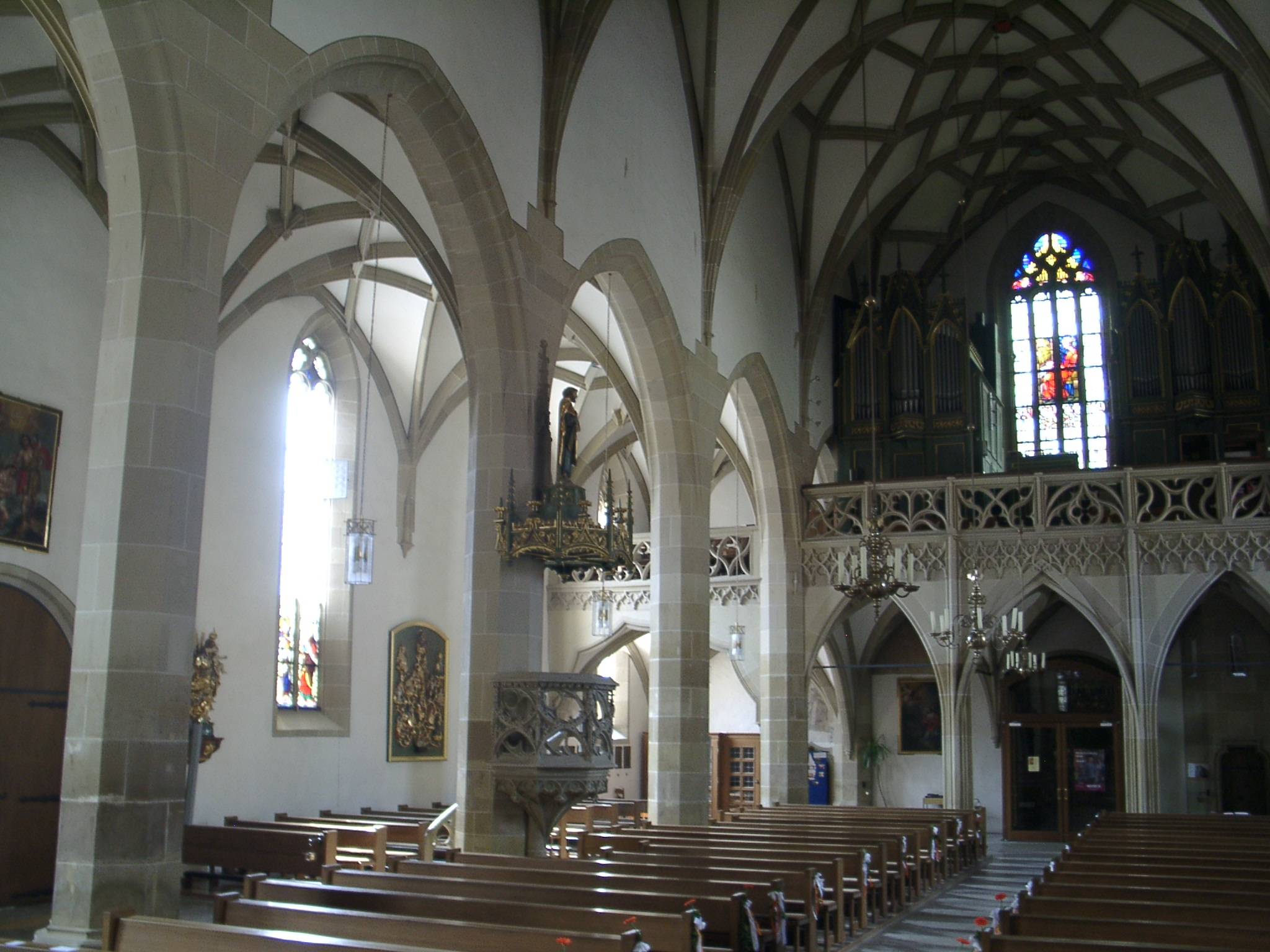 Pfarrkirche Königshofen im Grabfeld